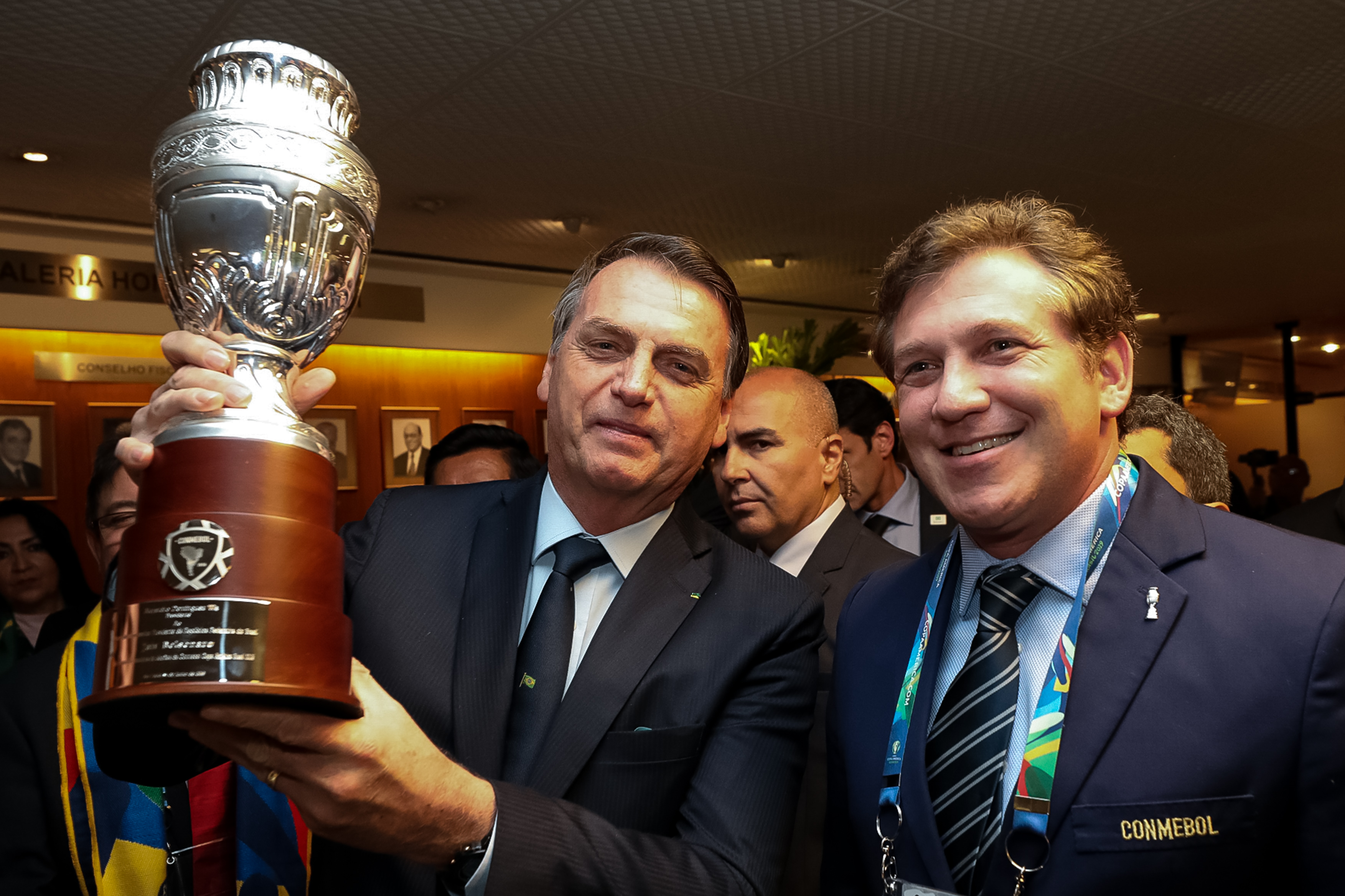 (São Paulo - SP, 14/06/2019) Presidente da República, Jair Bolsonaro recebe taça das mãos do sr. Alejandro Dominguez, Presidente da Conmebol. Foto: Marcos Corrêa/PR